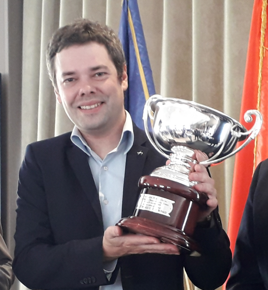 Il pilota francese Alexandre Stricher alla premiazione dell'eRallye Monte Carlo 2019 con la coppa per il minor consumo